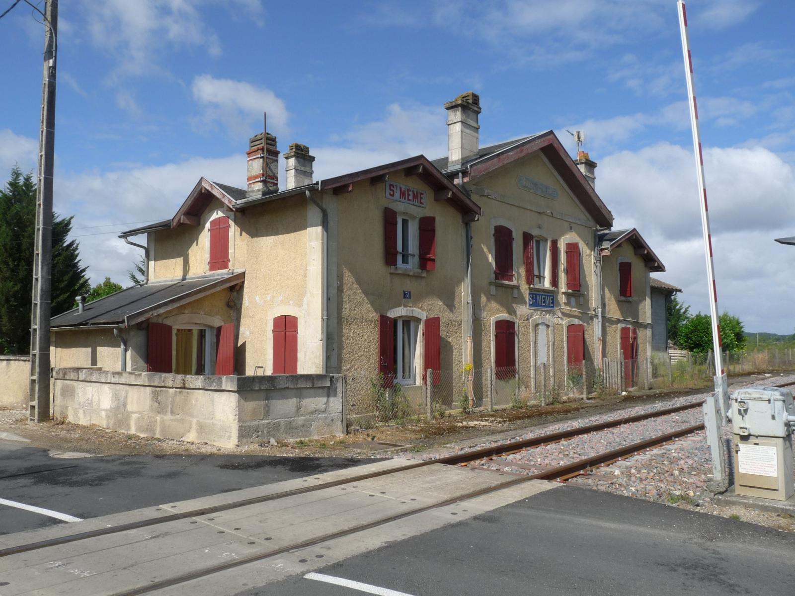 Ancienne gare de St-Même-les-Carrières, Charente, France